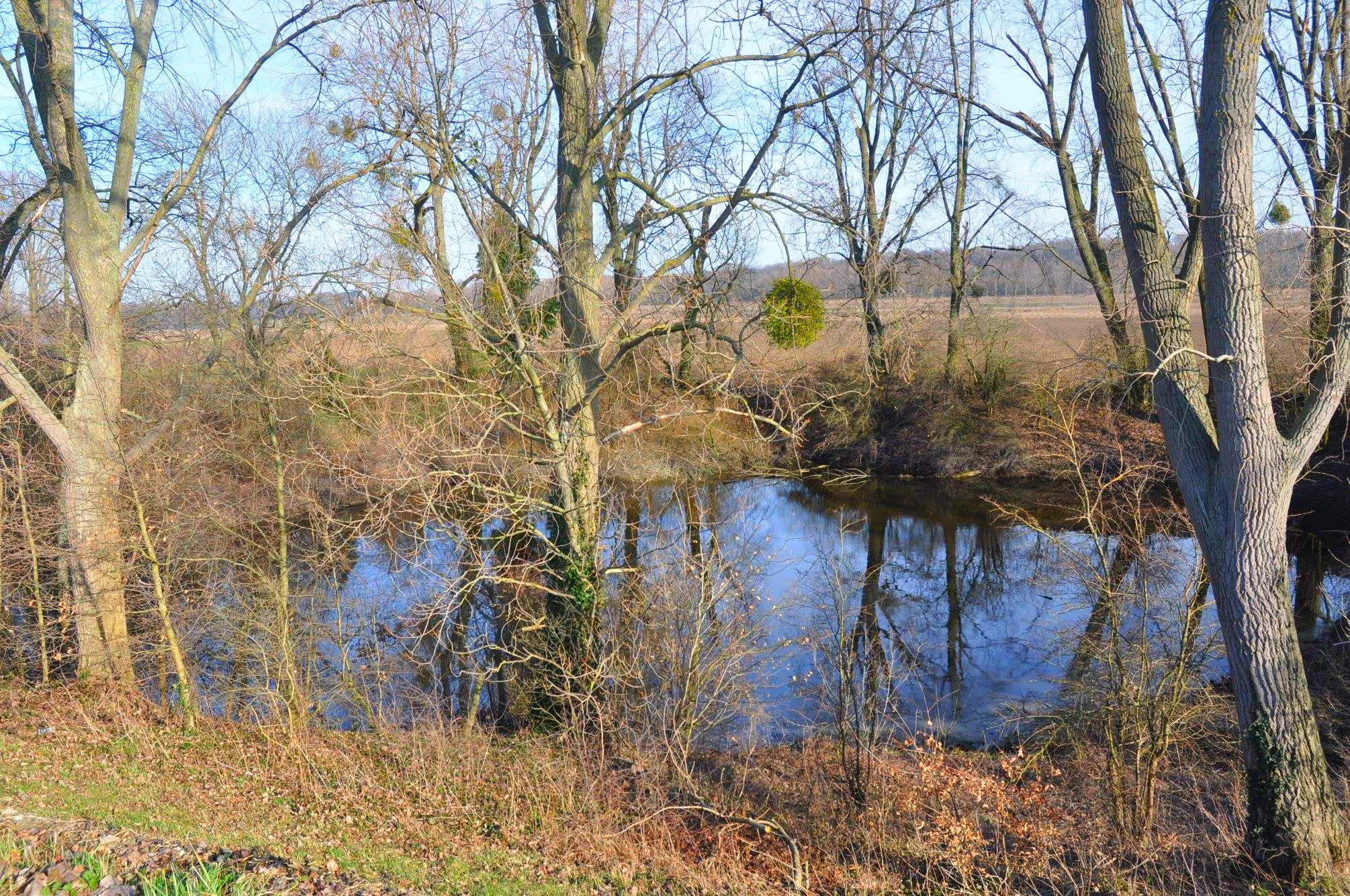 De Duvelskoel te Kotem